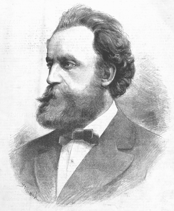 Portrét, nakreslený Janem Vilímkem pro Humoristické listy